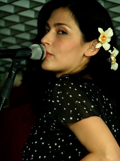 Show Marina de La Riva na FNAC Pinheiros, em São Paulo. Data: 08/03/2008. Foto por Débora Morbi.